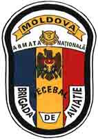 Brigada de Aviaţie